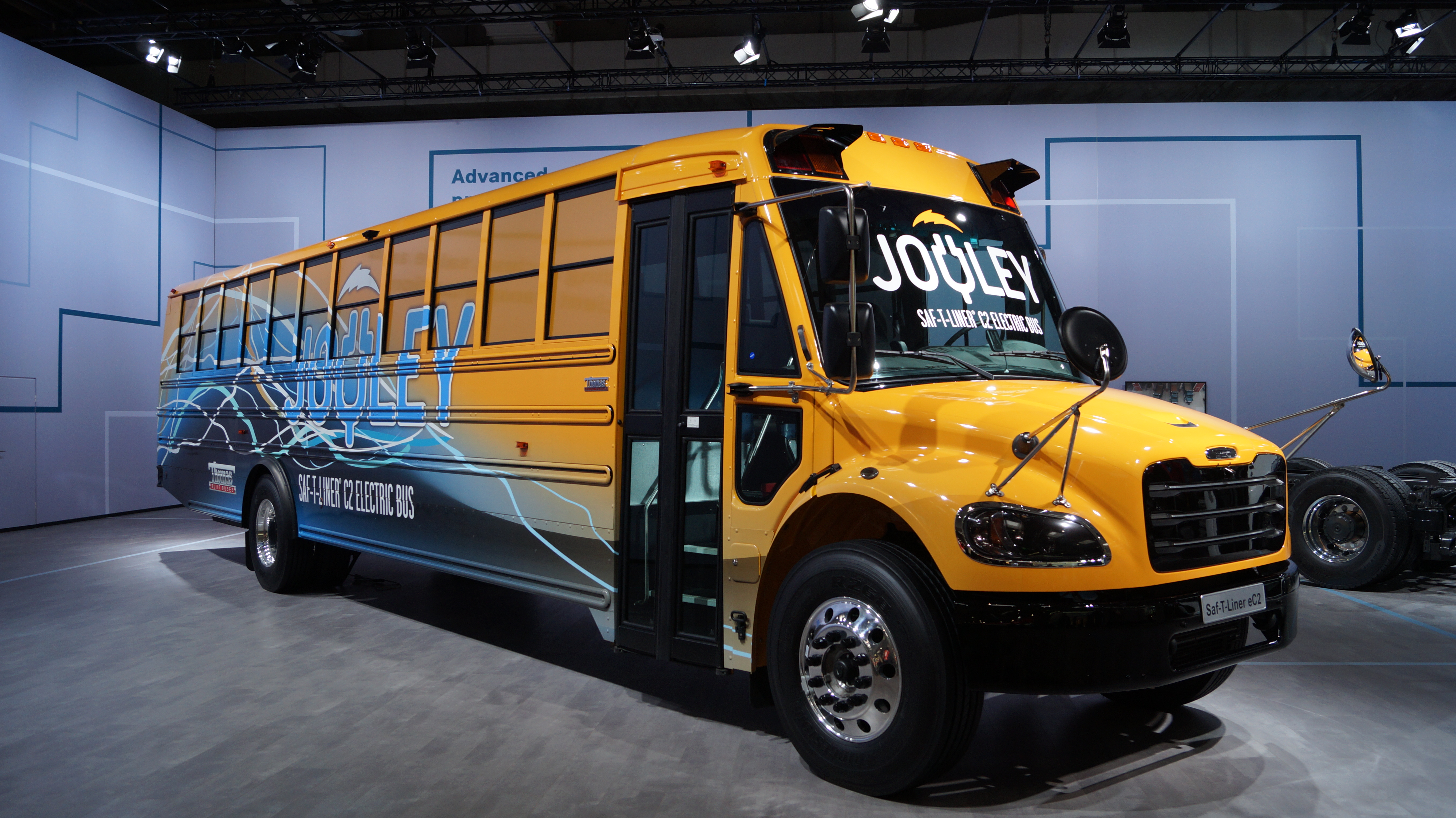 Schrägansicht der Front eines Thomas Saf-T-Liner eC2 Jouley, ausgestellt auf der IAA 2018.